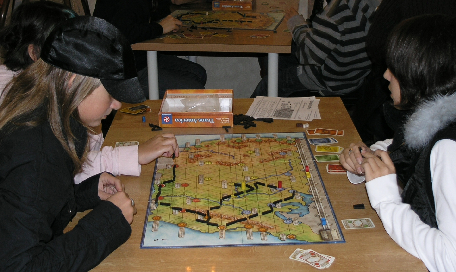 Herní festival Deskohraní 2008 - Trans America